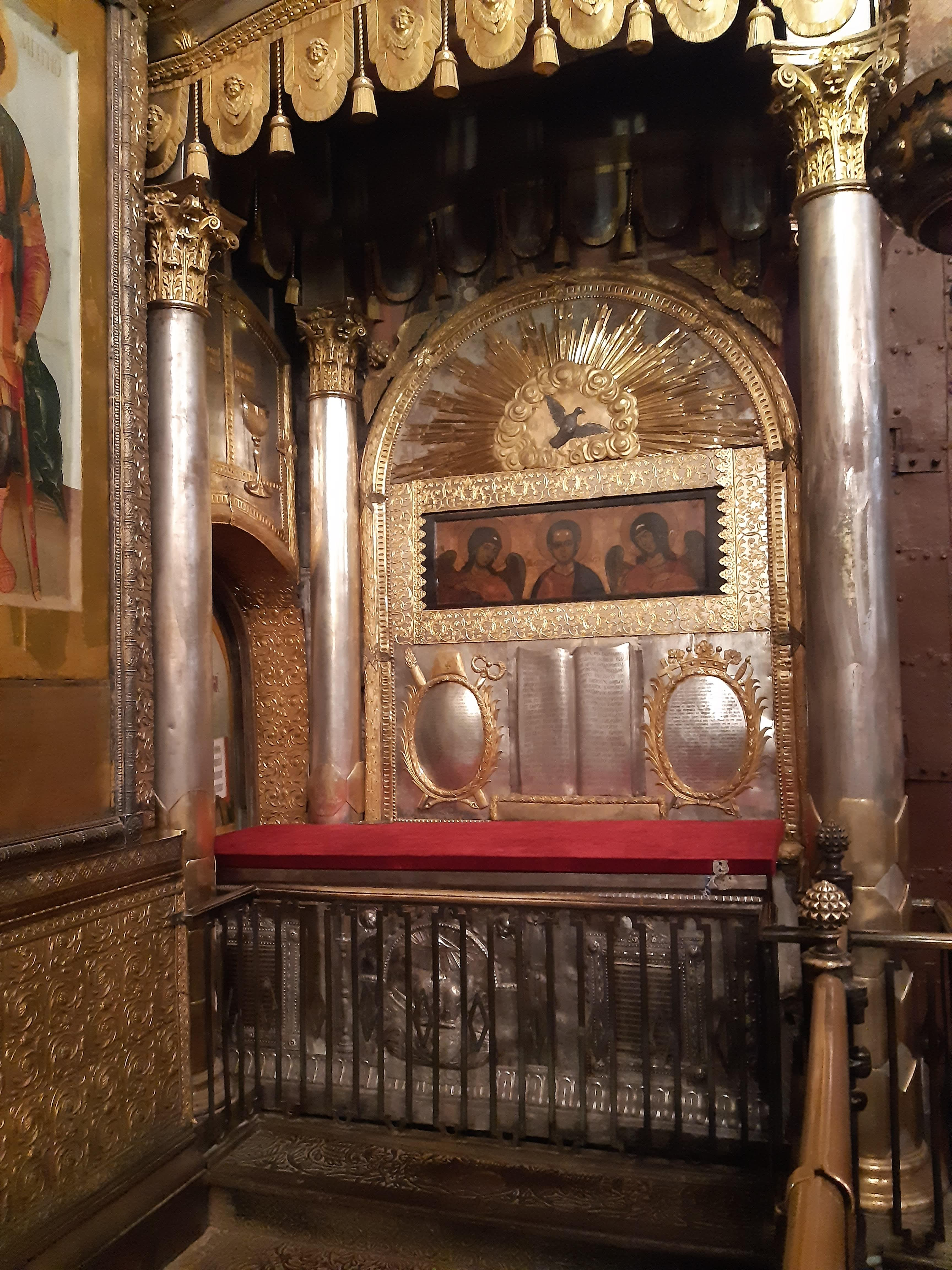 Успенский собор Московского Кремля, интерьер